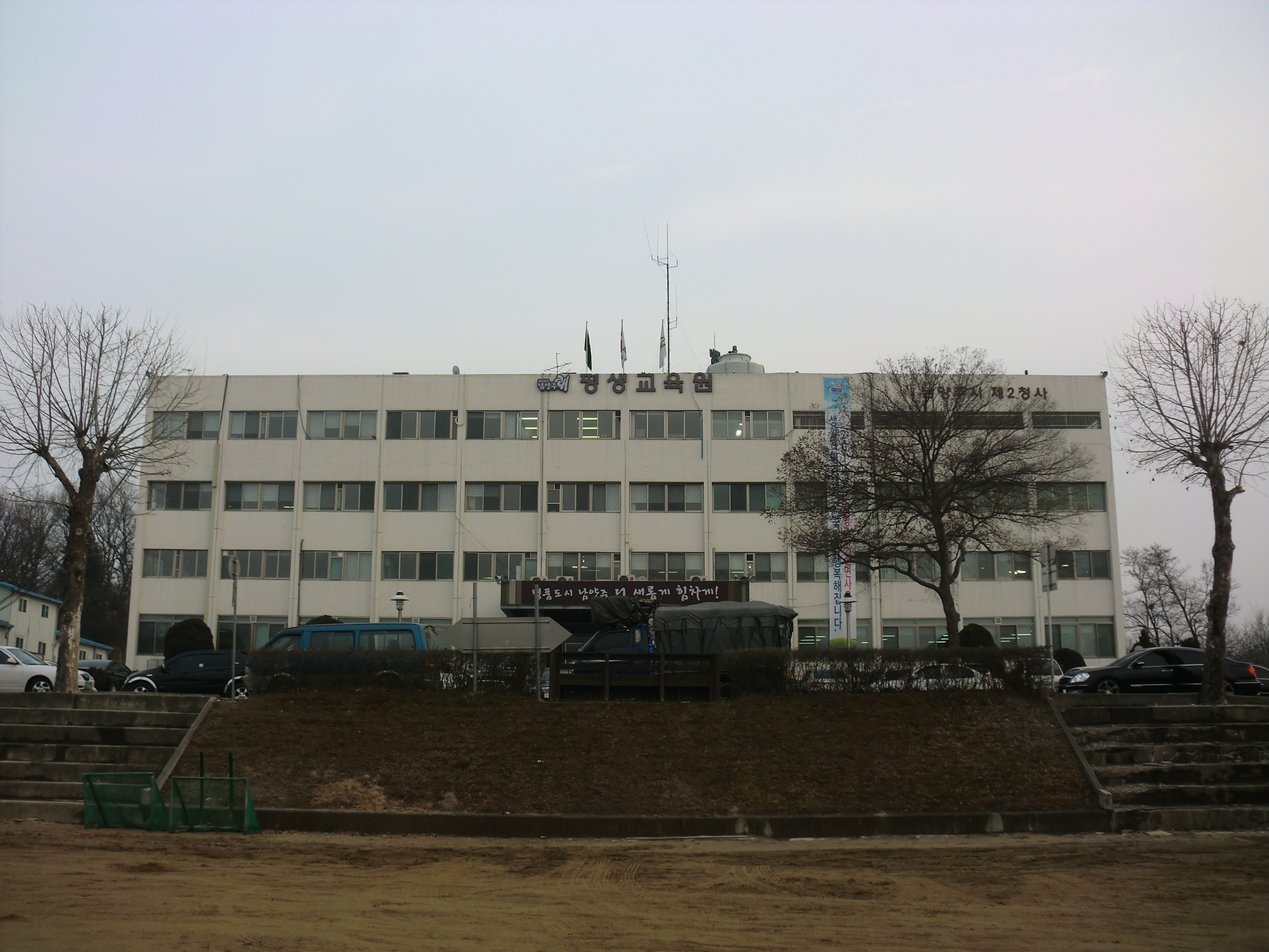 경기도 남양주시에 있는 남양주시청 제2청사